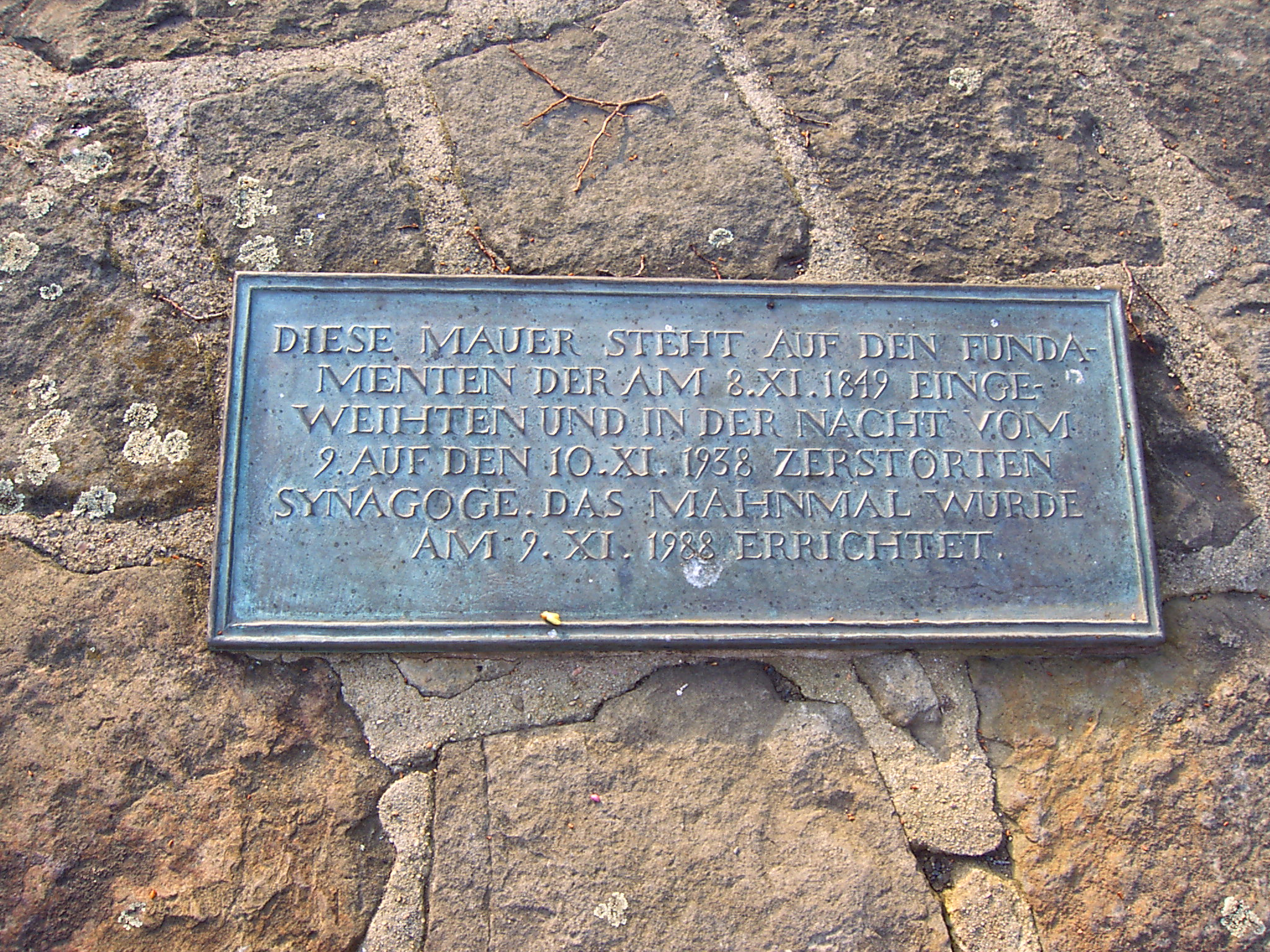 Hinweistafel auf der Umfassungsmauer des Hildesheimer Synagogenmahnmals